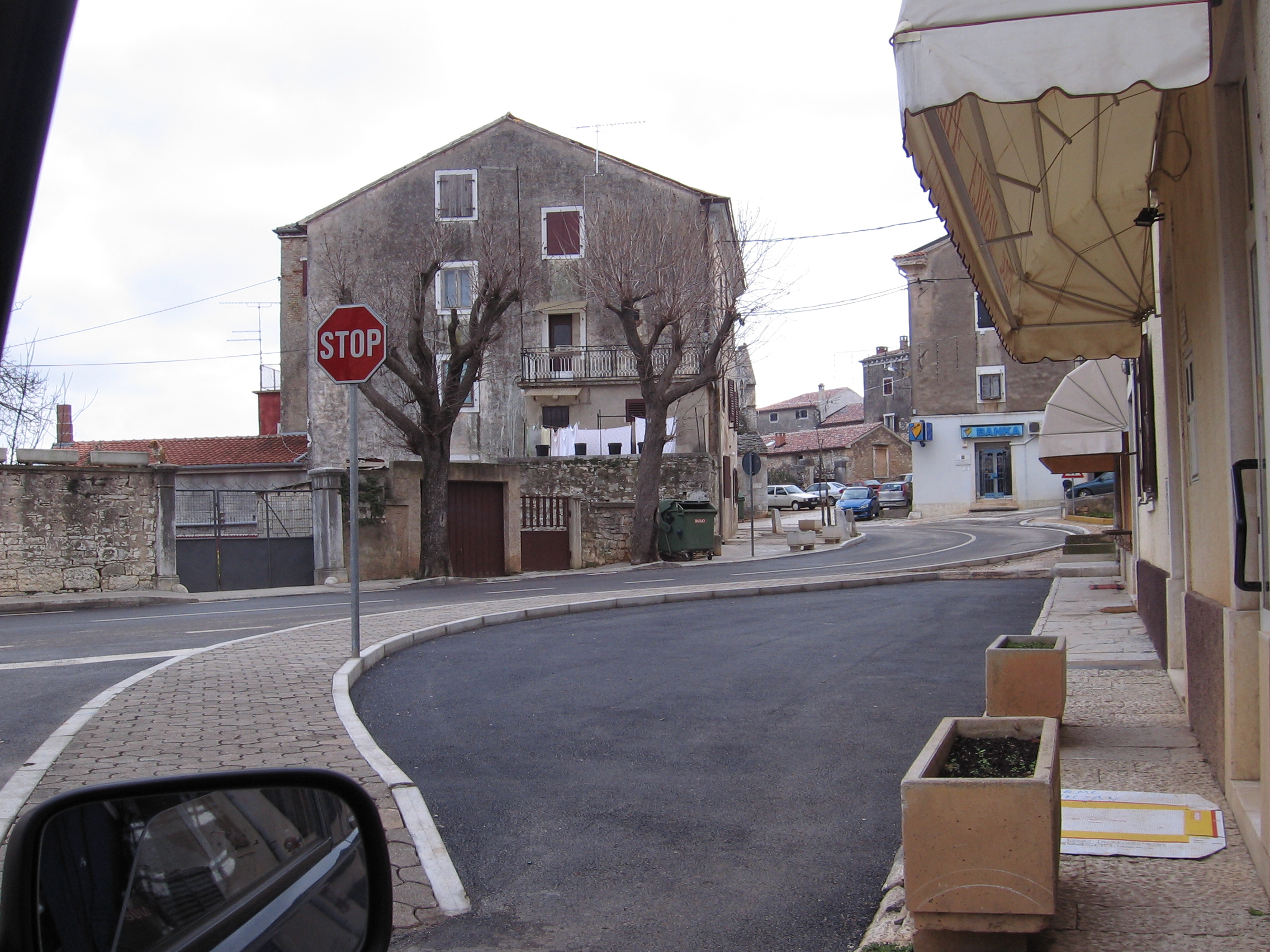 Višnjan